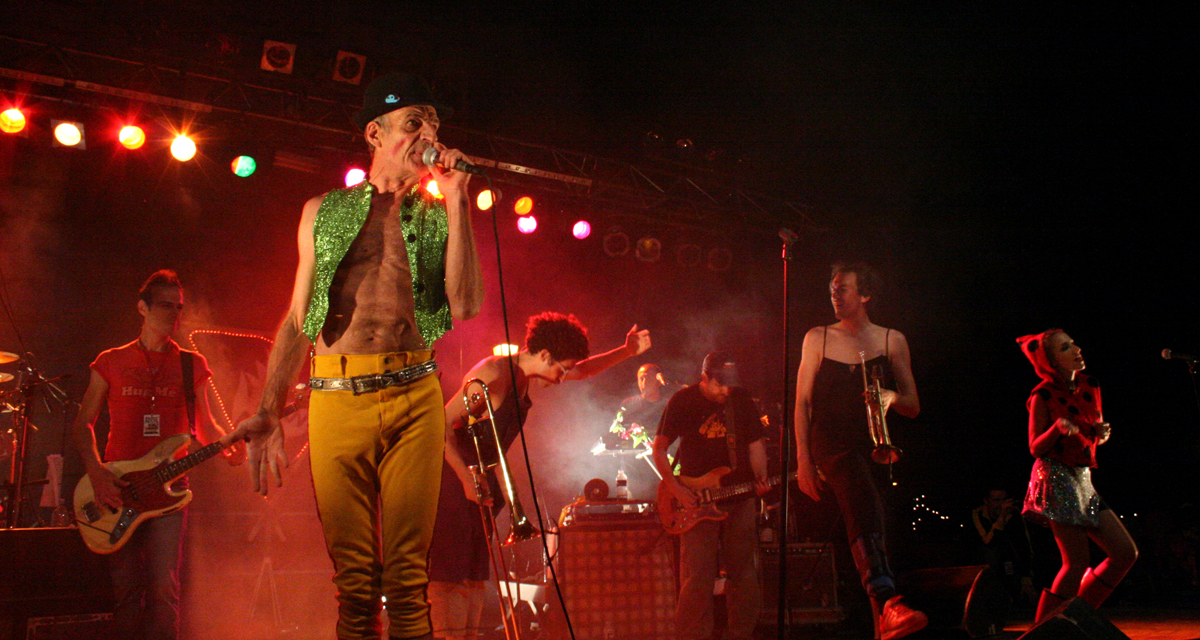 Raoul Petite, groupe de rock agricole sophistiqué, en concert le 28 avril 2007 à L'Isle-sur-la-Sorgue, Vaucluse, France